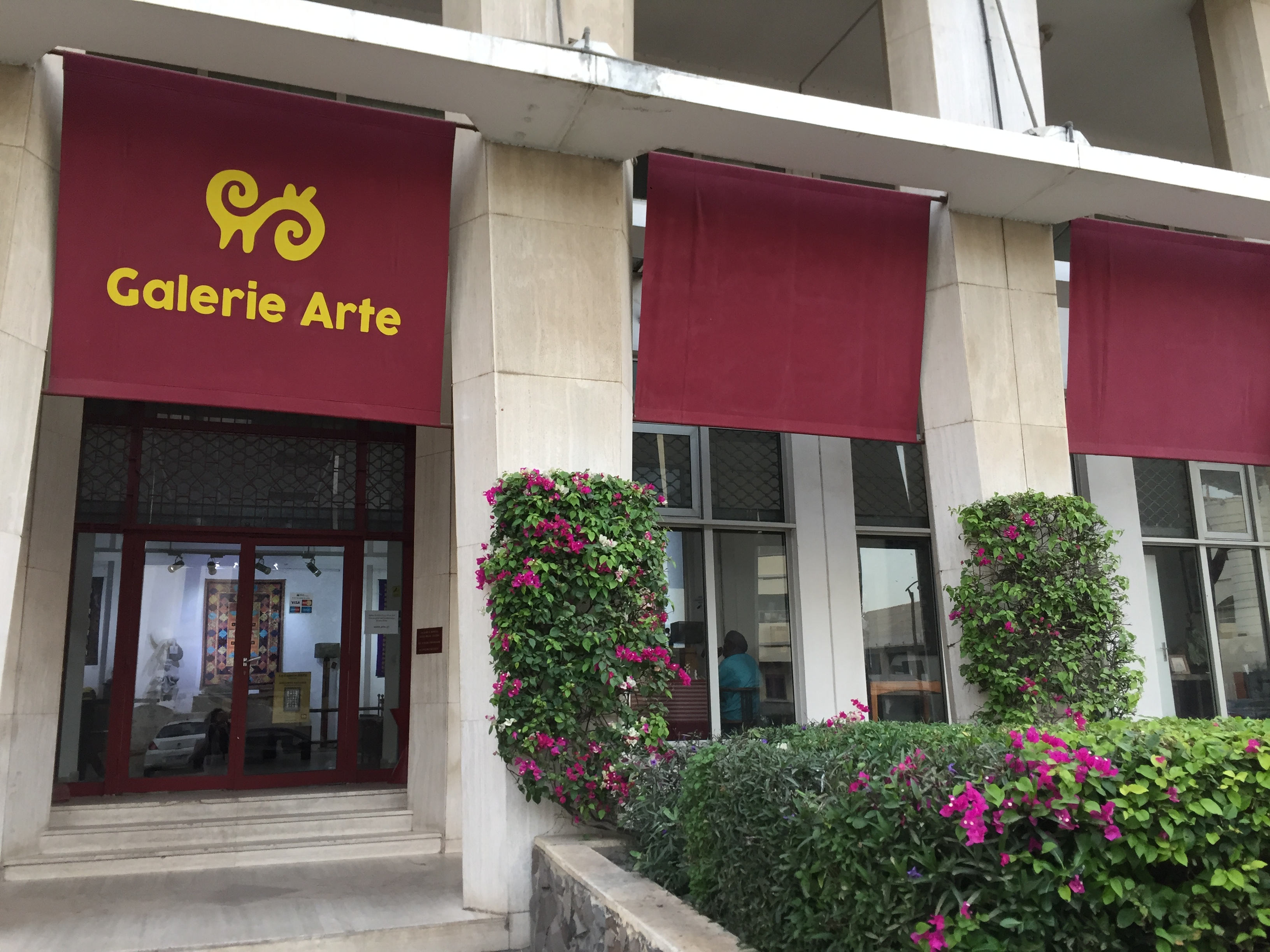 Façade extérieur de la galerie Arte.